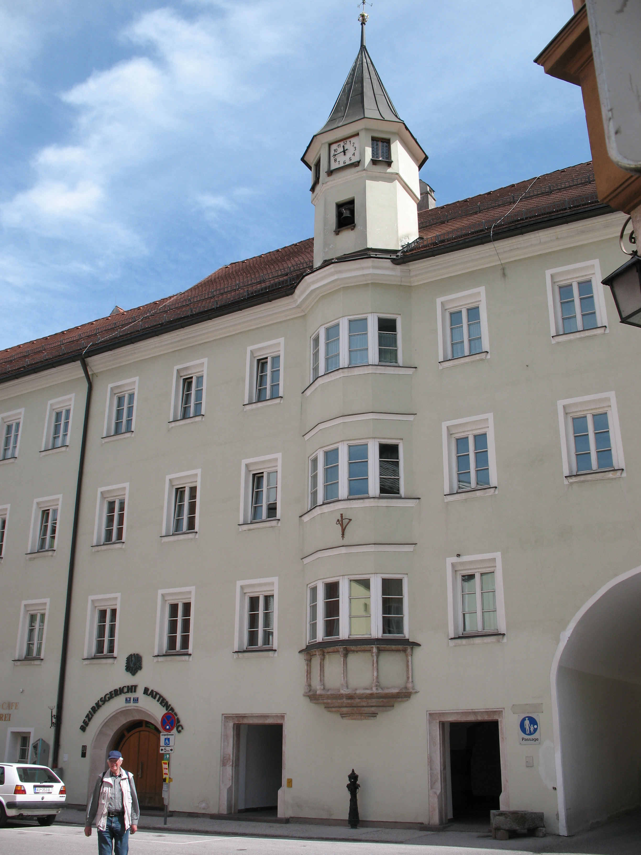 Bezirksgericht